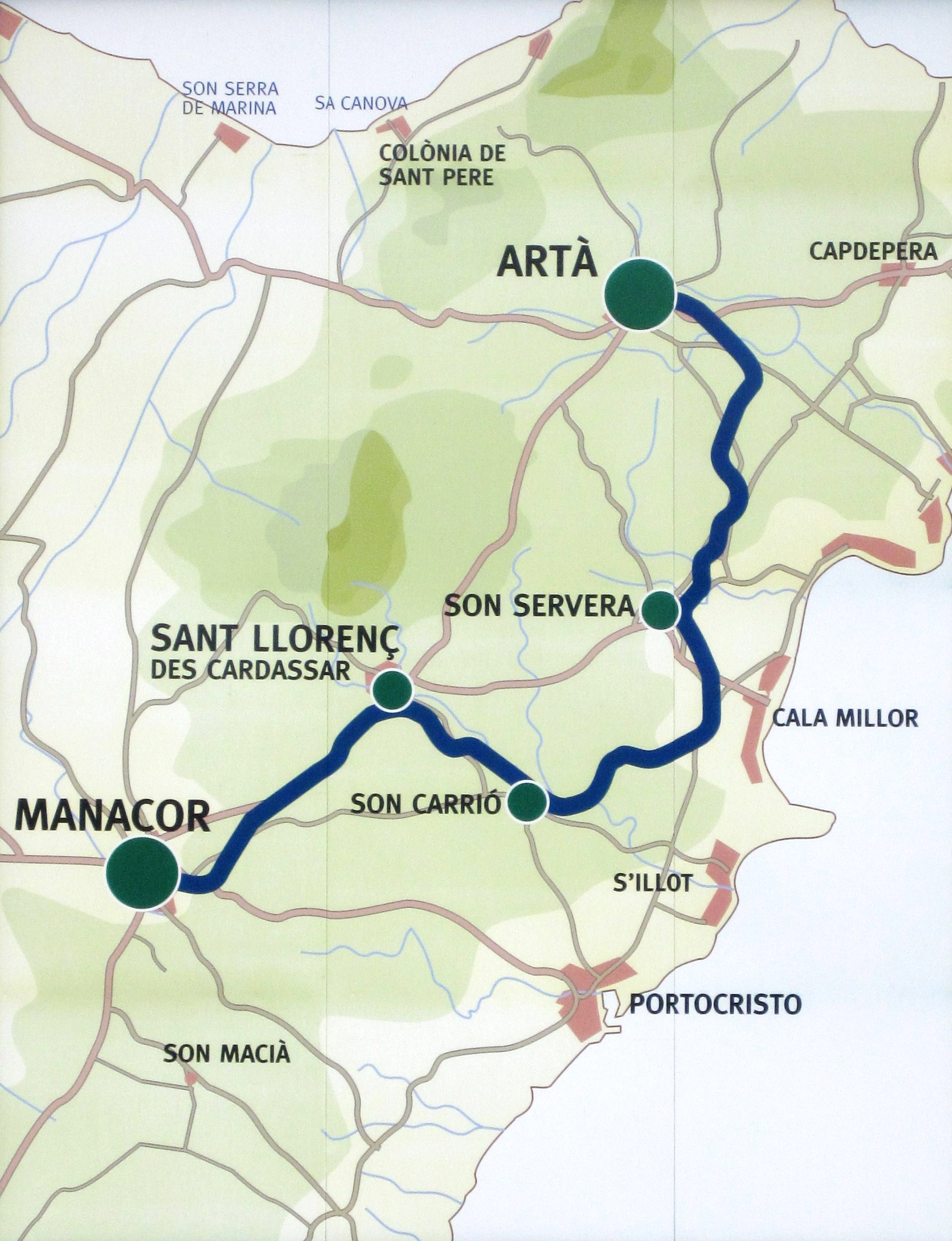 Karte auf einem Bauschild der Bahnlinie Manacor – Artà im September 2010 am Bahnhof von Artà, Mallorca, Spanien